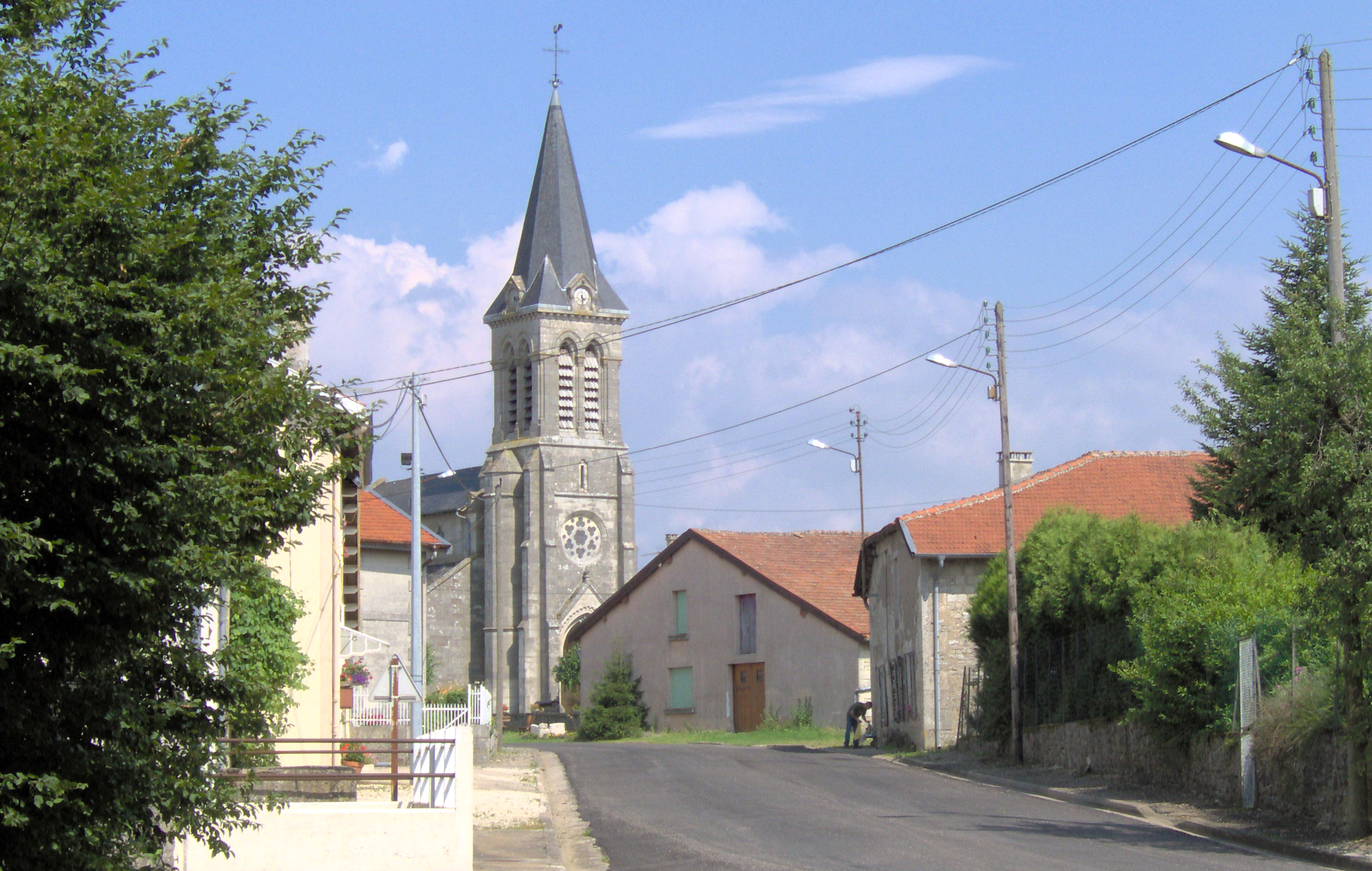 Fouchères-aux-bois Kierch.